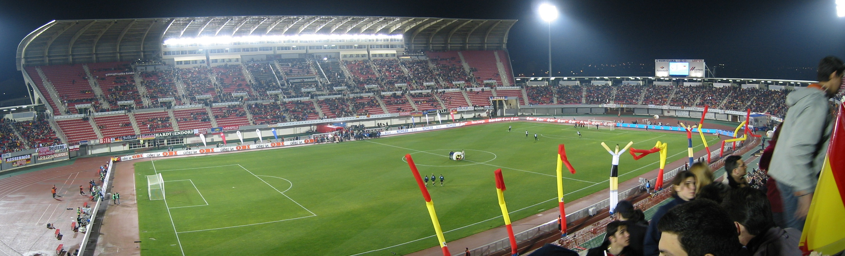 Partit amistós entre les seleccions d?Espanya i Alemanya a Son Moix al febrer de 2003. Panoramica de l'estadi abans de començar el partit presa des de la nostra localitat ("tribuna sol").